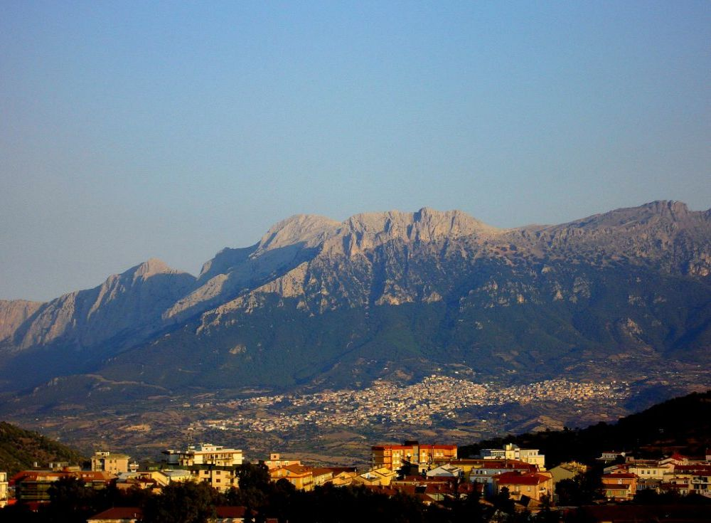 Panorama di Oliena